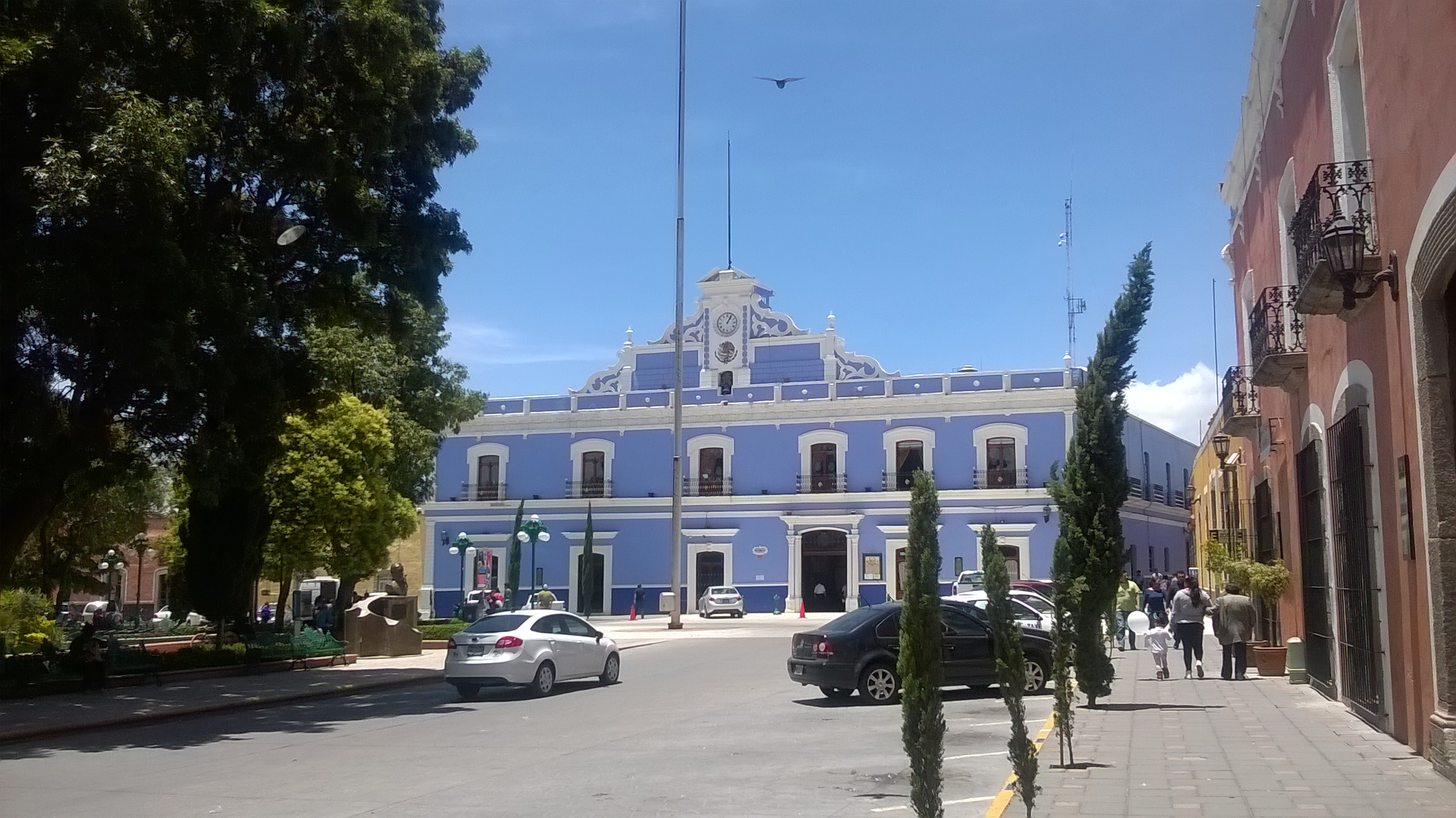 Presidencia Municipal de Huamantla, Tlaxcala